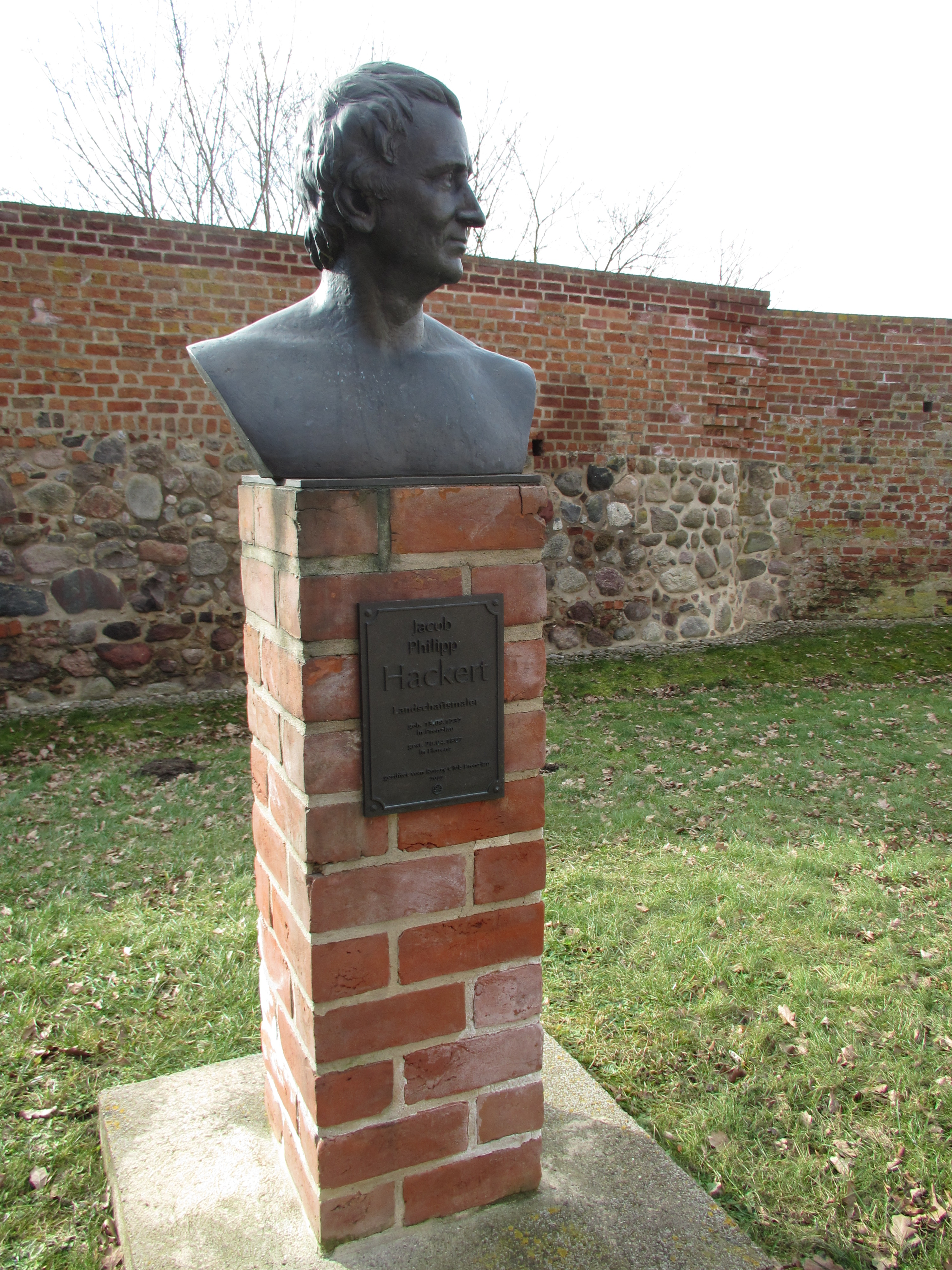 Philipp Hackert Porträtbüste